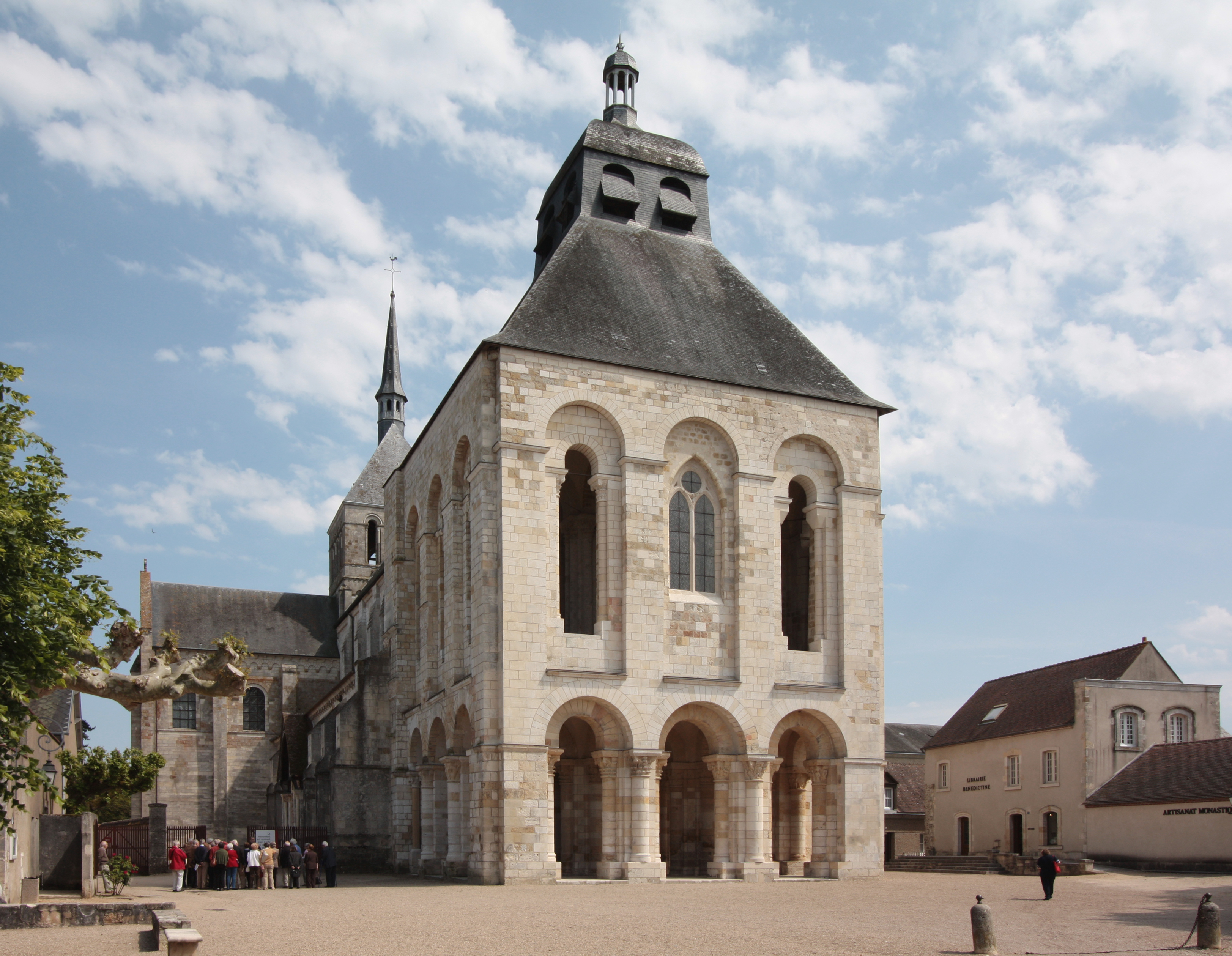 Benediktinerabtei Saint-Benoît-sur-Loire oder Saint-Benoît-de-Fleury in der Ortschaft Saint-Benoît-sur-Loire bei Sully-sur-Loire an der Loire in Frankreich - Zugang mit Vorhallenturm